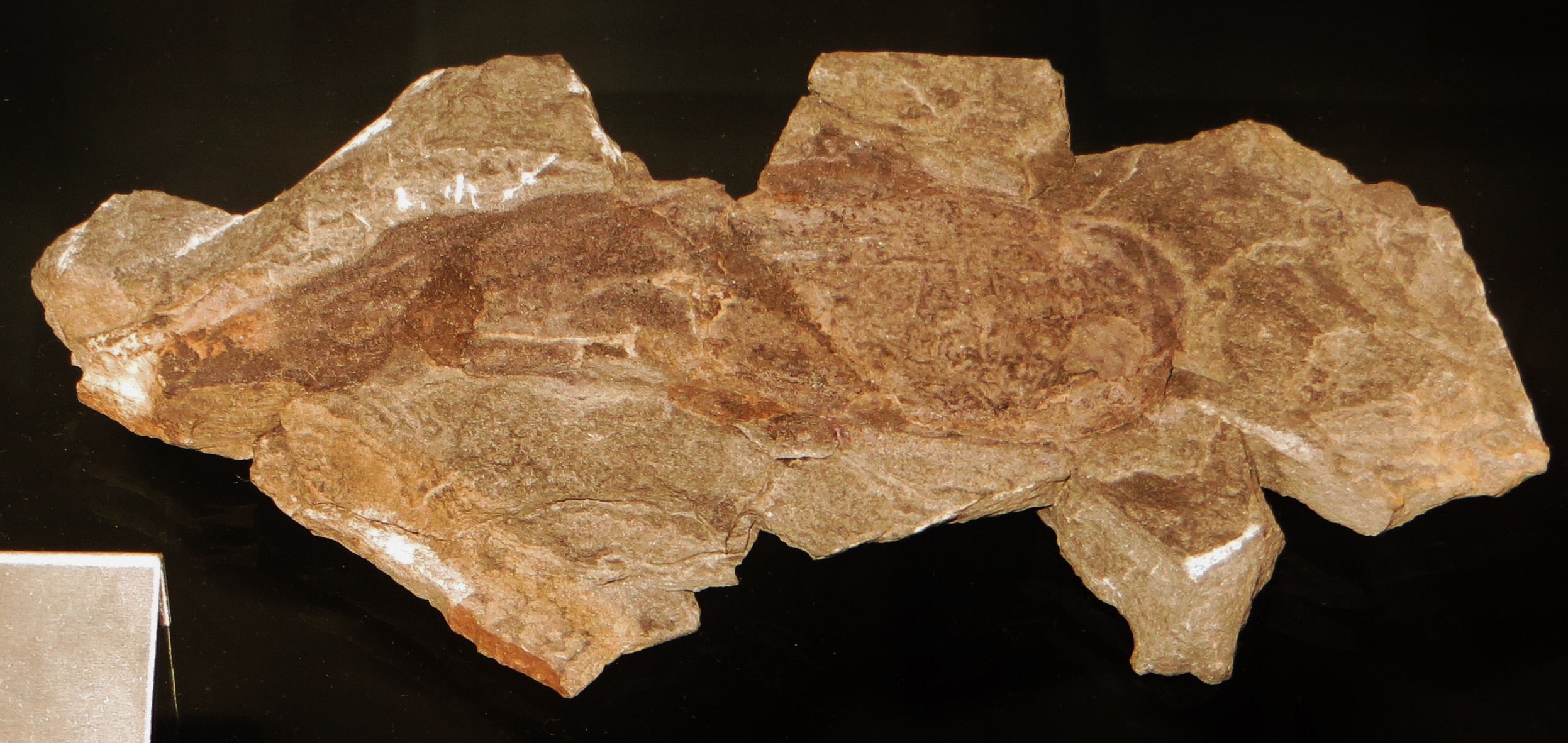 Fossil of Acaciella - Took the picture at Museon, Den Haag